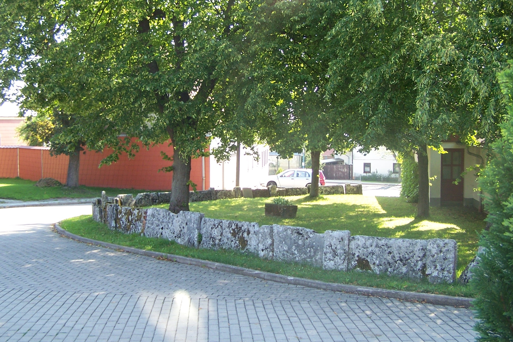 In der Ortslage Craula.